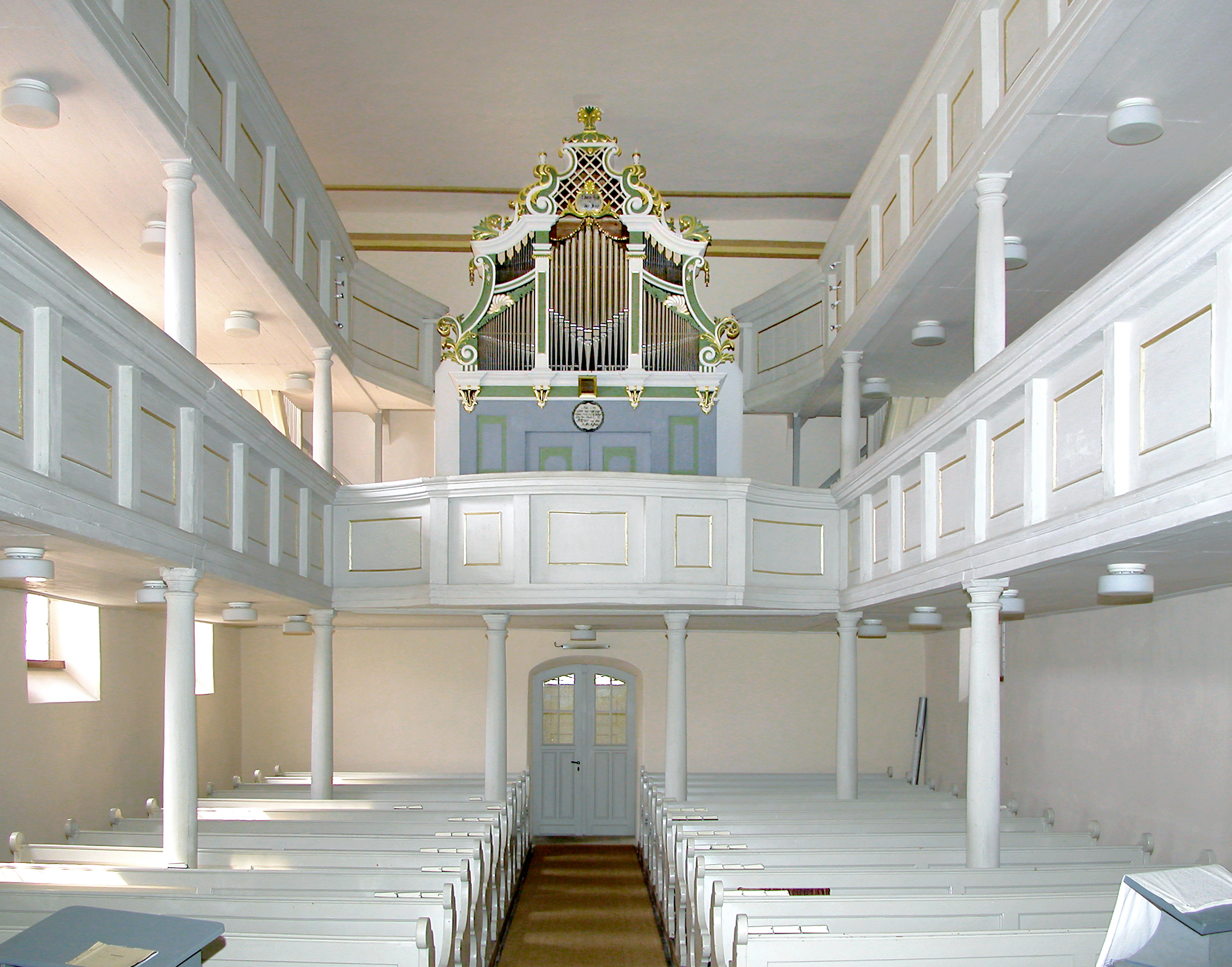 21.03.2009 04703 Bockelwitz: Dorfkirche, 1797 an Stelle einer älteren, baufälligen Kirche neu erbaut. Die Pläne stammen vom Amtszimmermeister August Bormann aus Wermsdorf, der den Bau auch zusammen mit dem Amtsmaurermeister Gottfried Wartig, beide aus Wermsdorf, ausführte. Kirchenpatron war Friedrich August von Carlowitz, der Besitzer des Ritterguts Kroptewitz. [DSCN35653.TIF]20090321010DR.JPG(c)Blobelt